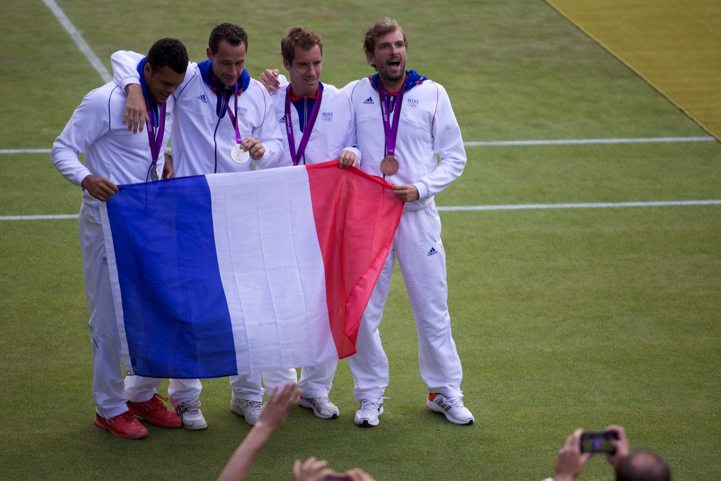 French Silver and Bronze Medallists